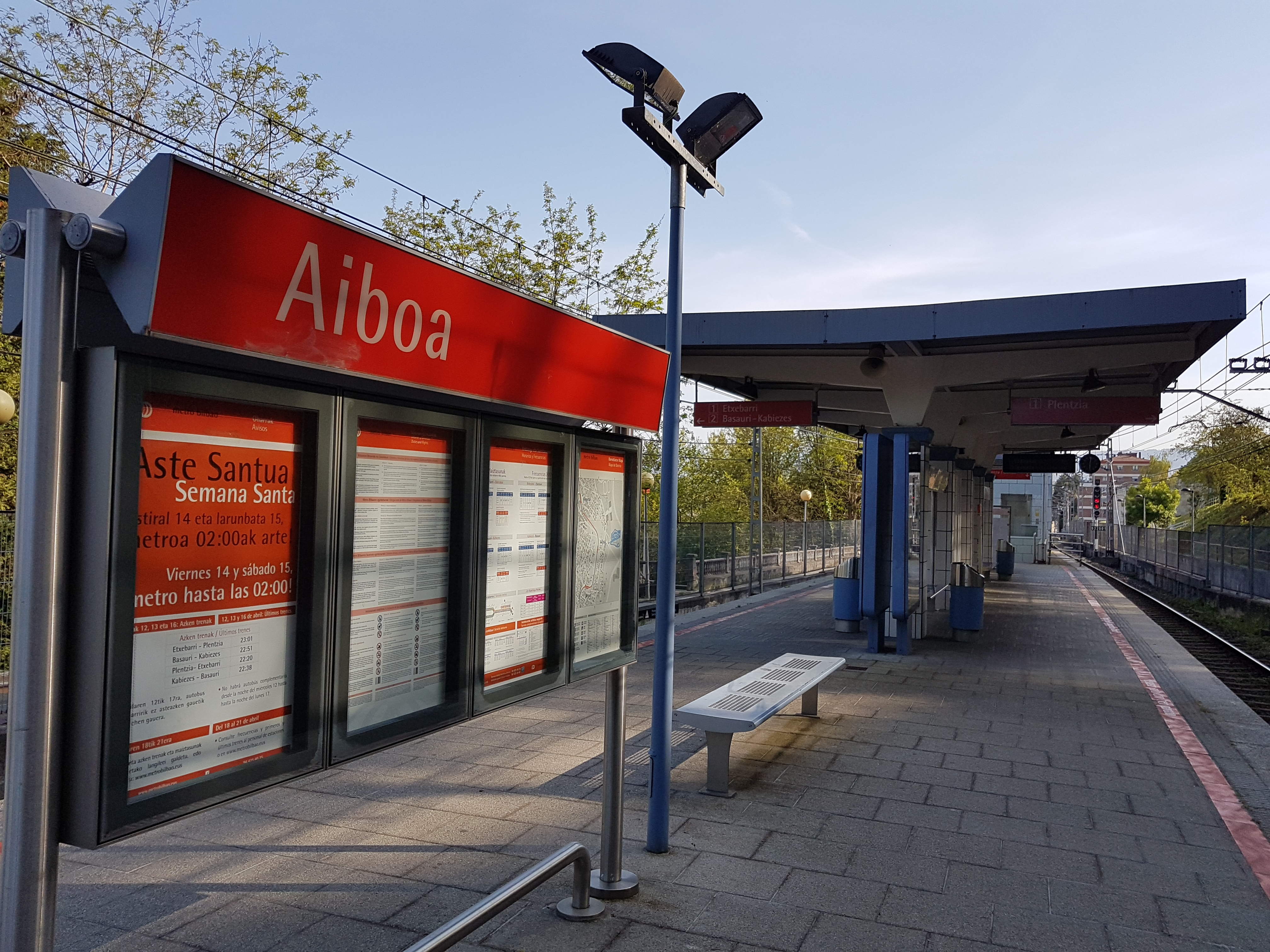 Estación de Aiboa.